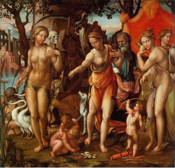 Les trois Parques, Marco Bigio, vers 1540/1550, Villa Barberini, Rome